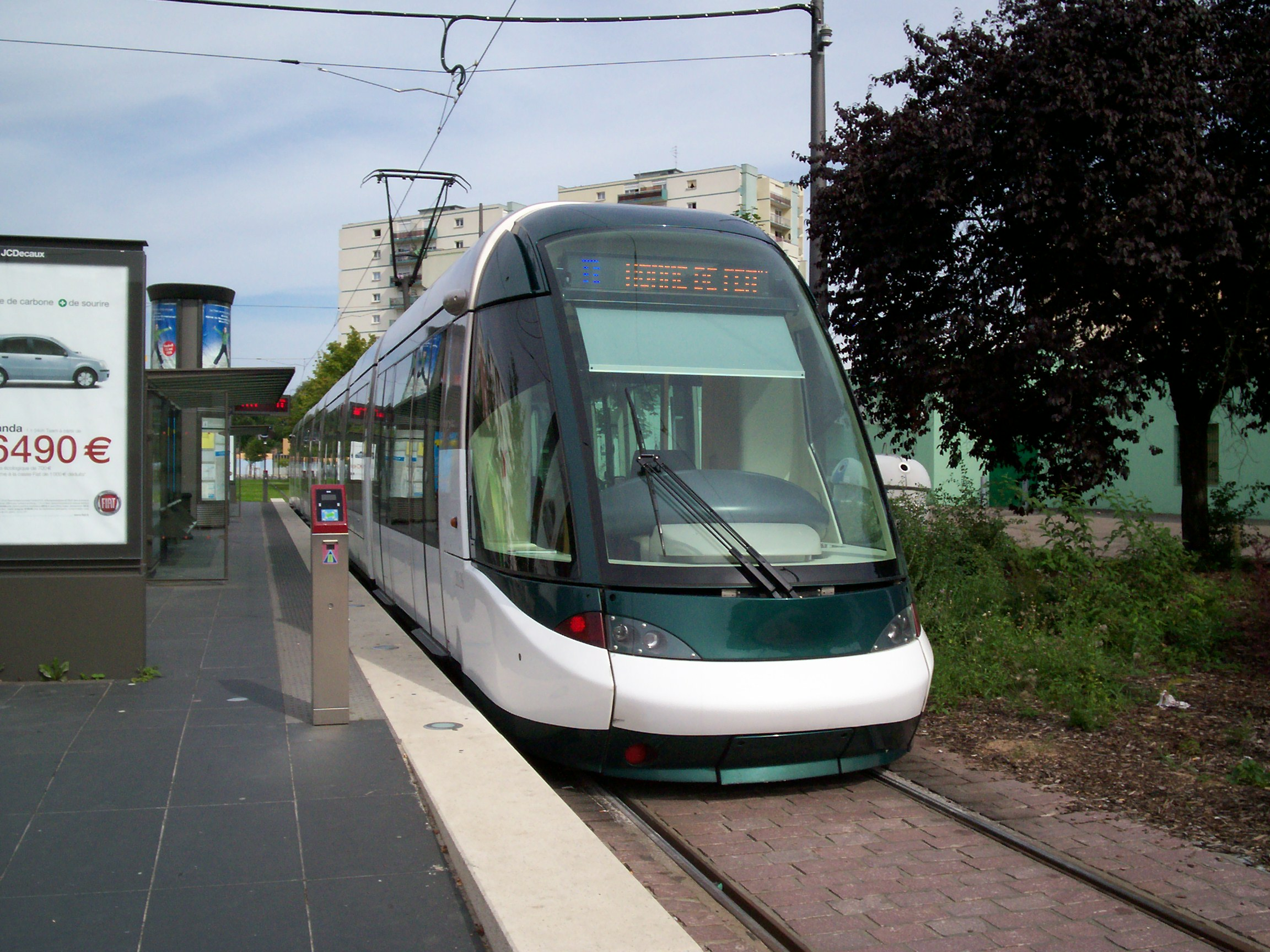 Tramway de Strasbourg